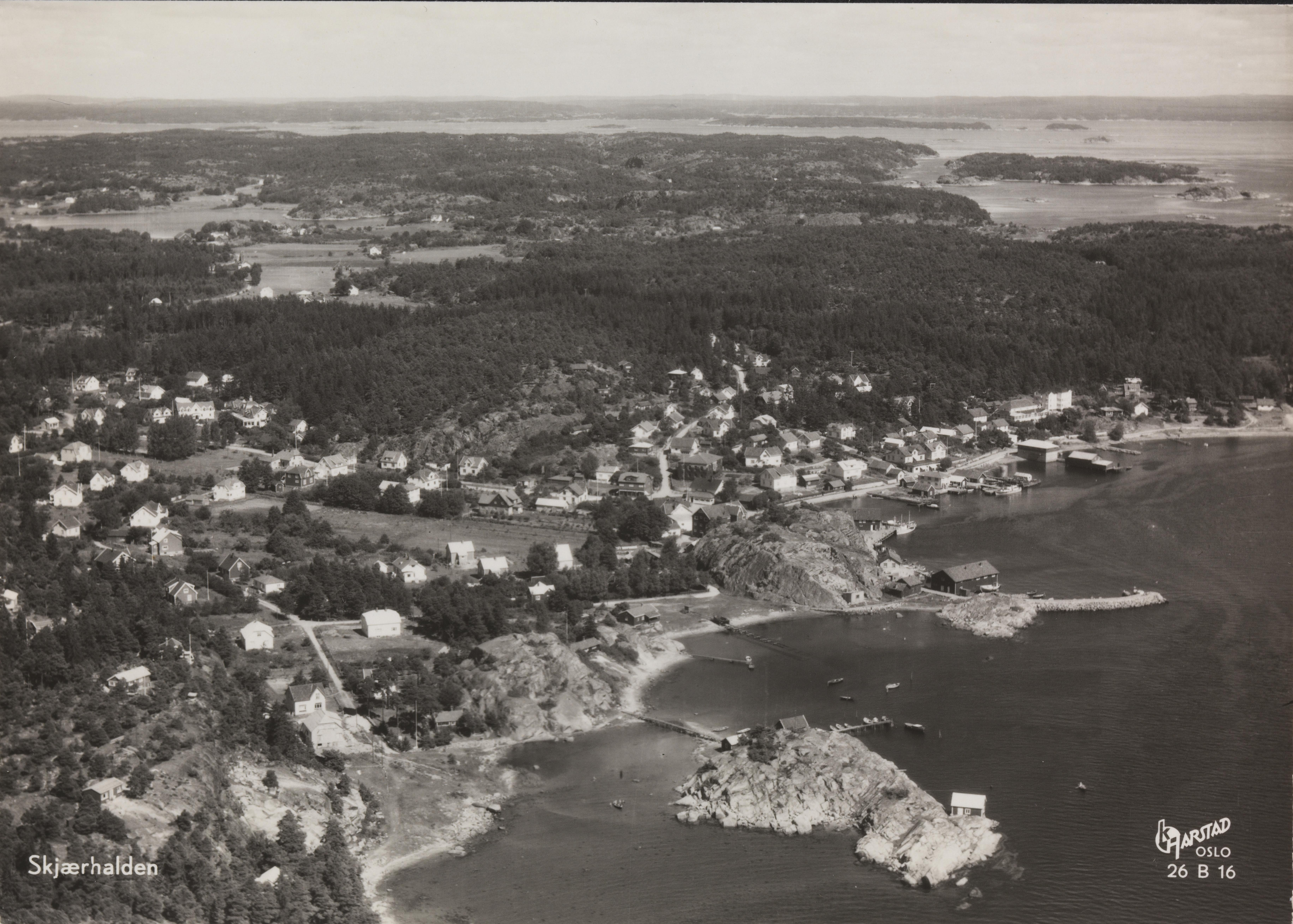 Bildet er hentet fra Nasjonalbibliotekets bildesamling Kirkøy,Skjærhalden, Hvaler, Østfold